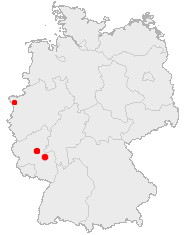 Ausgangspunkte und Siedlungsgebiet der "Pfälzer" am Niederrhein